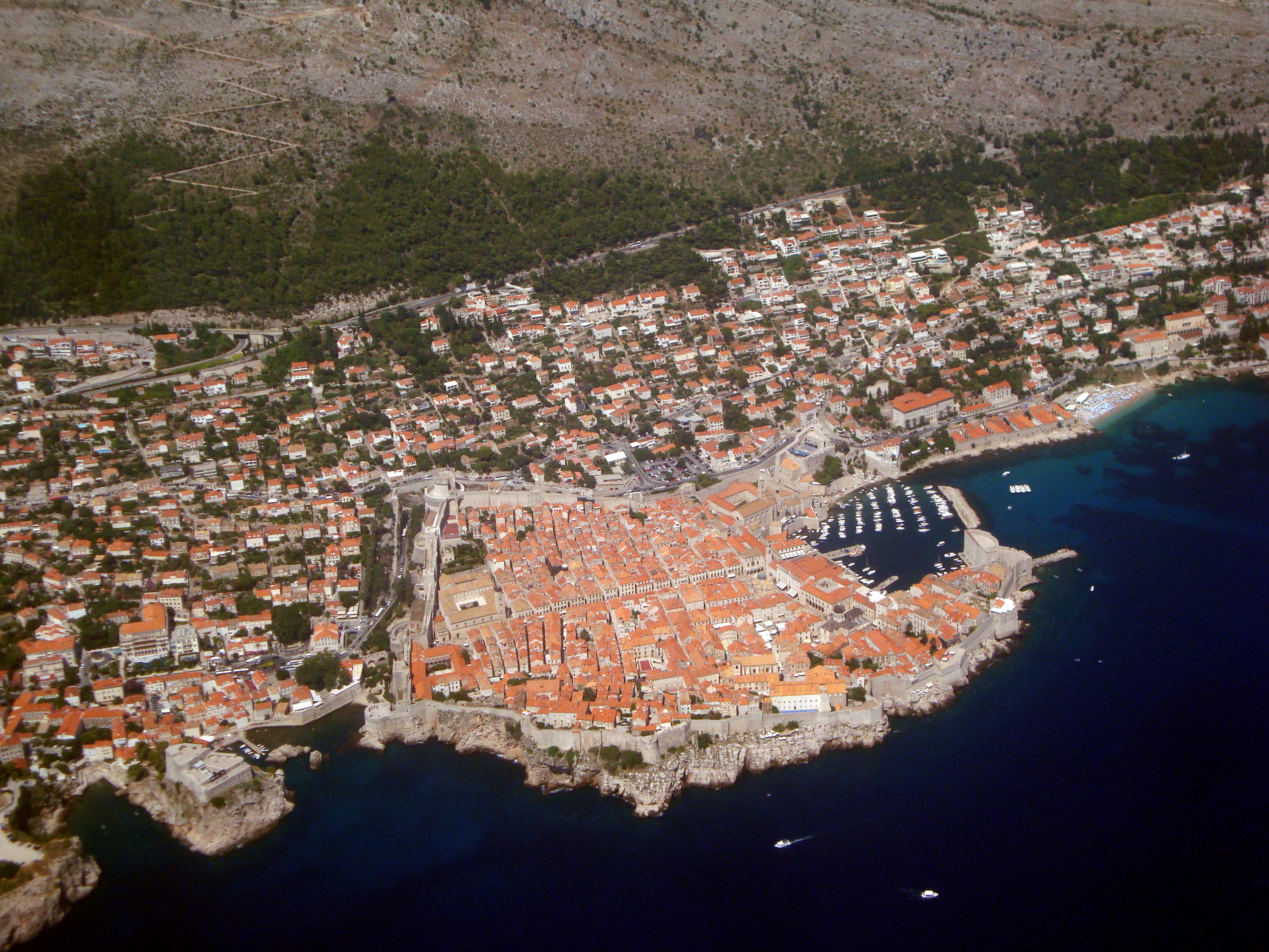 Vue aérienne du centre historique la ville de Dubrovnik (Croatie) prise par le hublot de l'avion. En arrière-plan, la route adriatique.